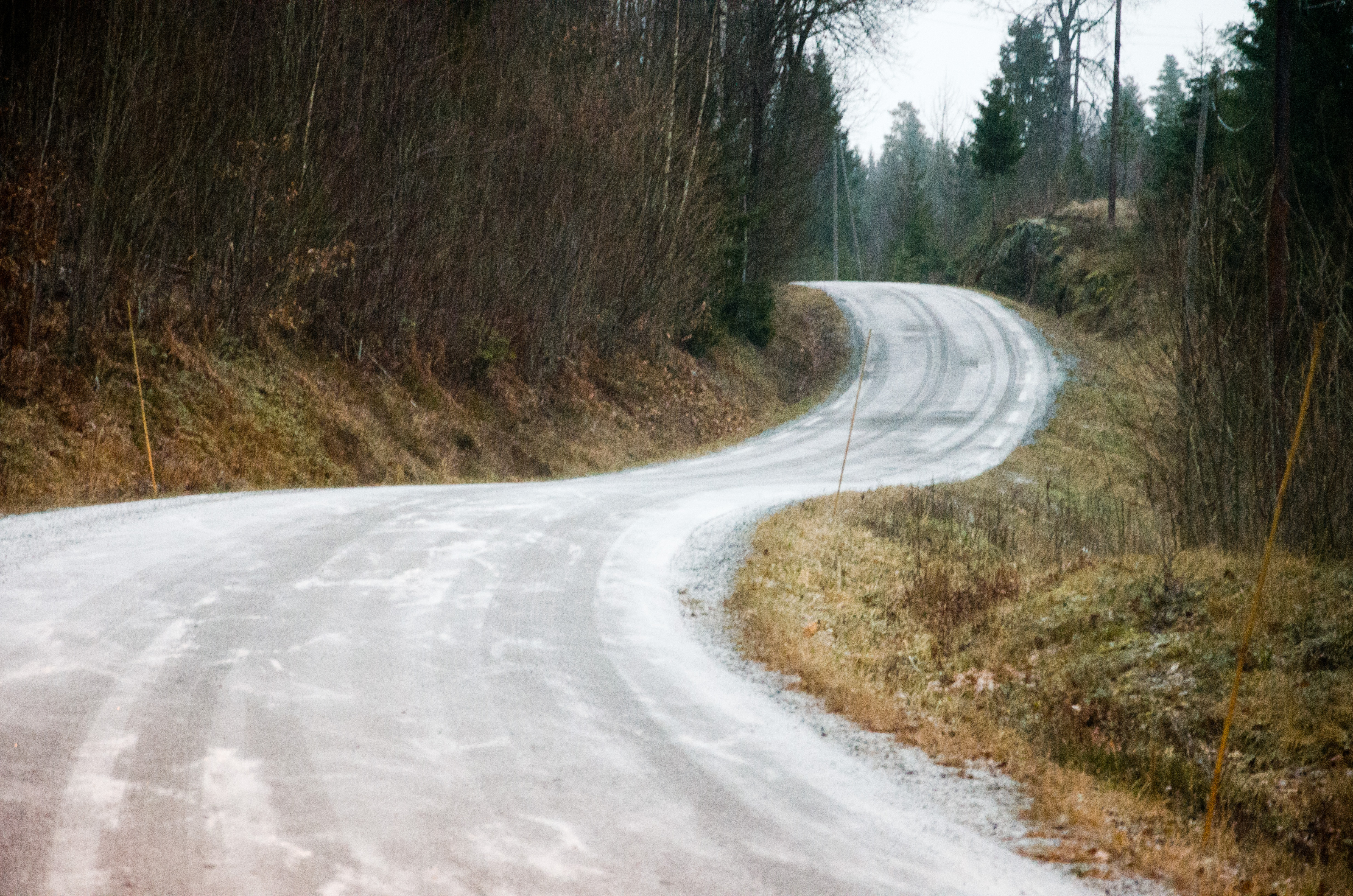 Fylkesvei 820 Damtjernveien